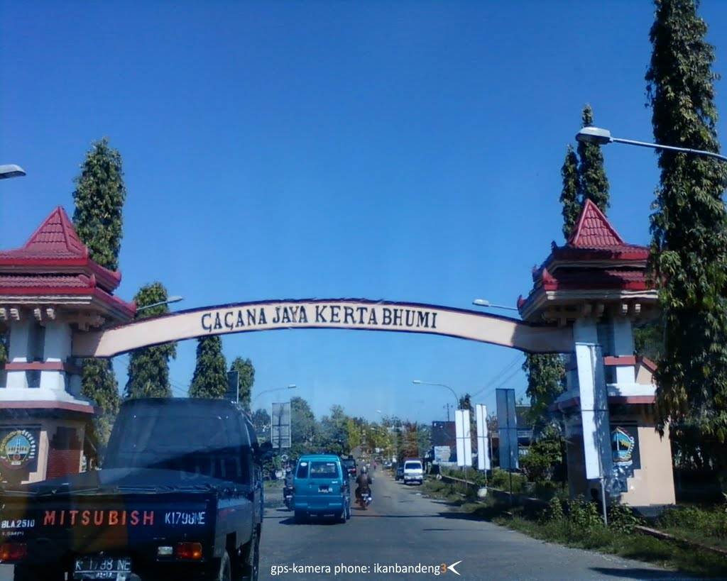 Pintu Gerbang Masuk Kota Blora dari arah Semarang